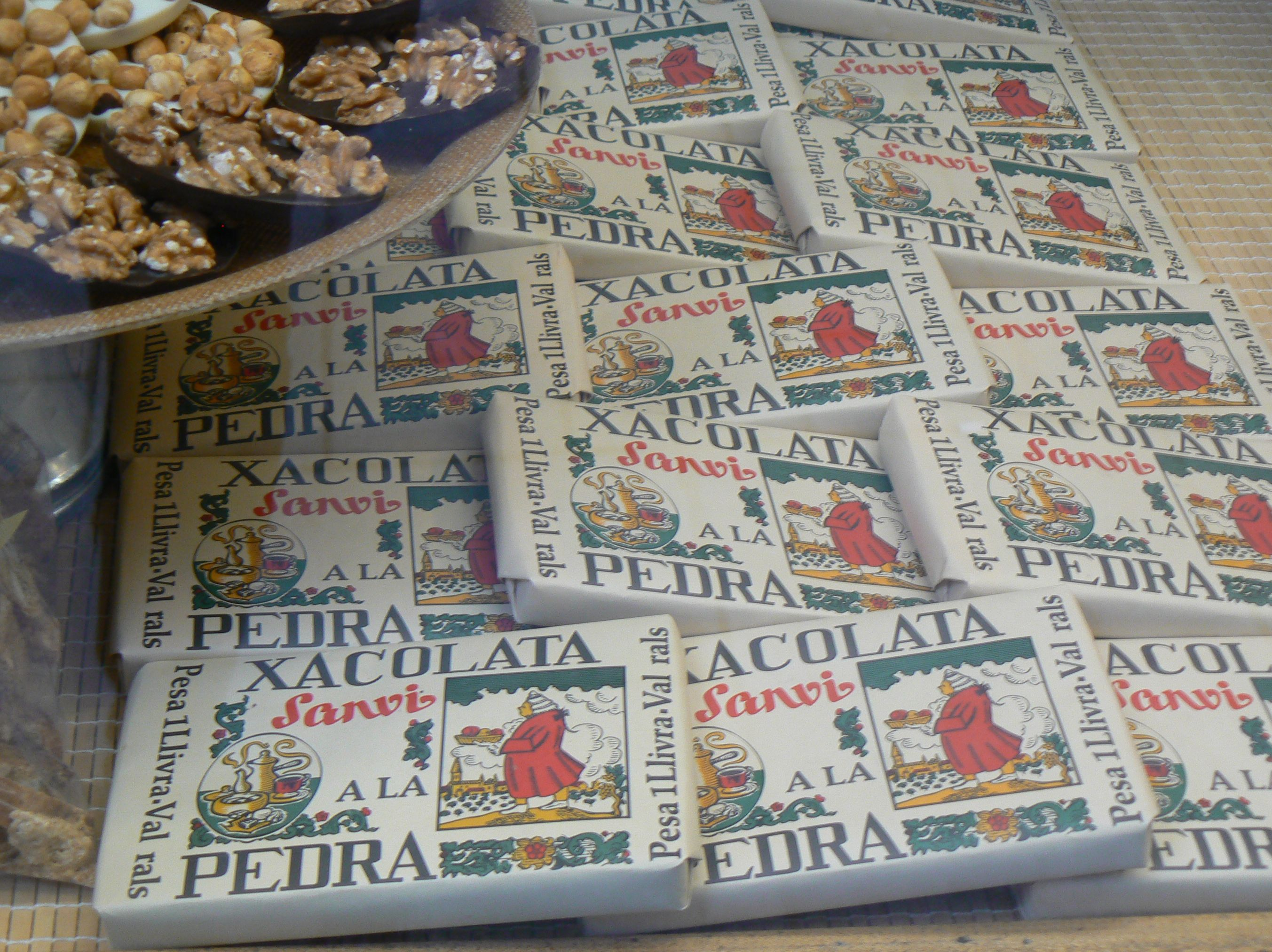 Barres de xoxolata a la pedra, per a preparar xocolata desfeta.